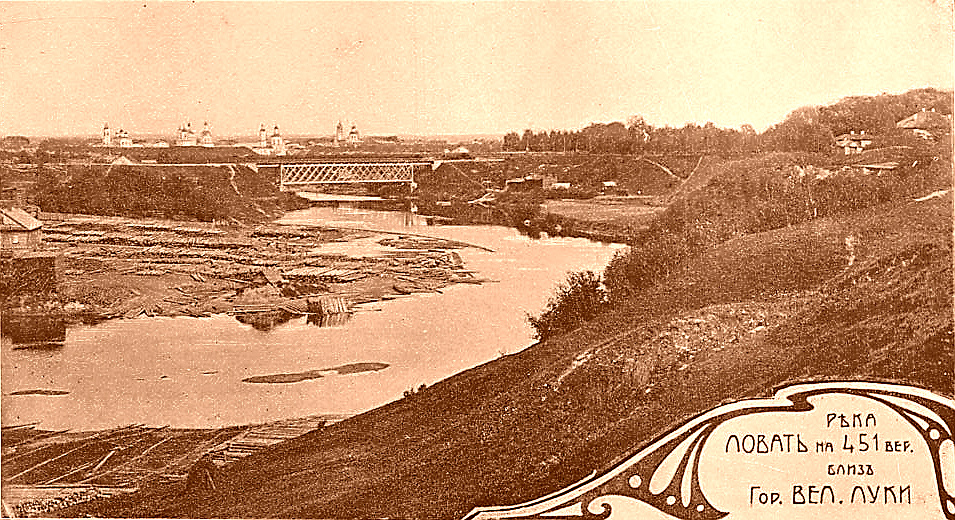 Река Ловать на 451 версте близ города Великие Луки